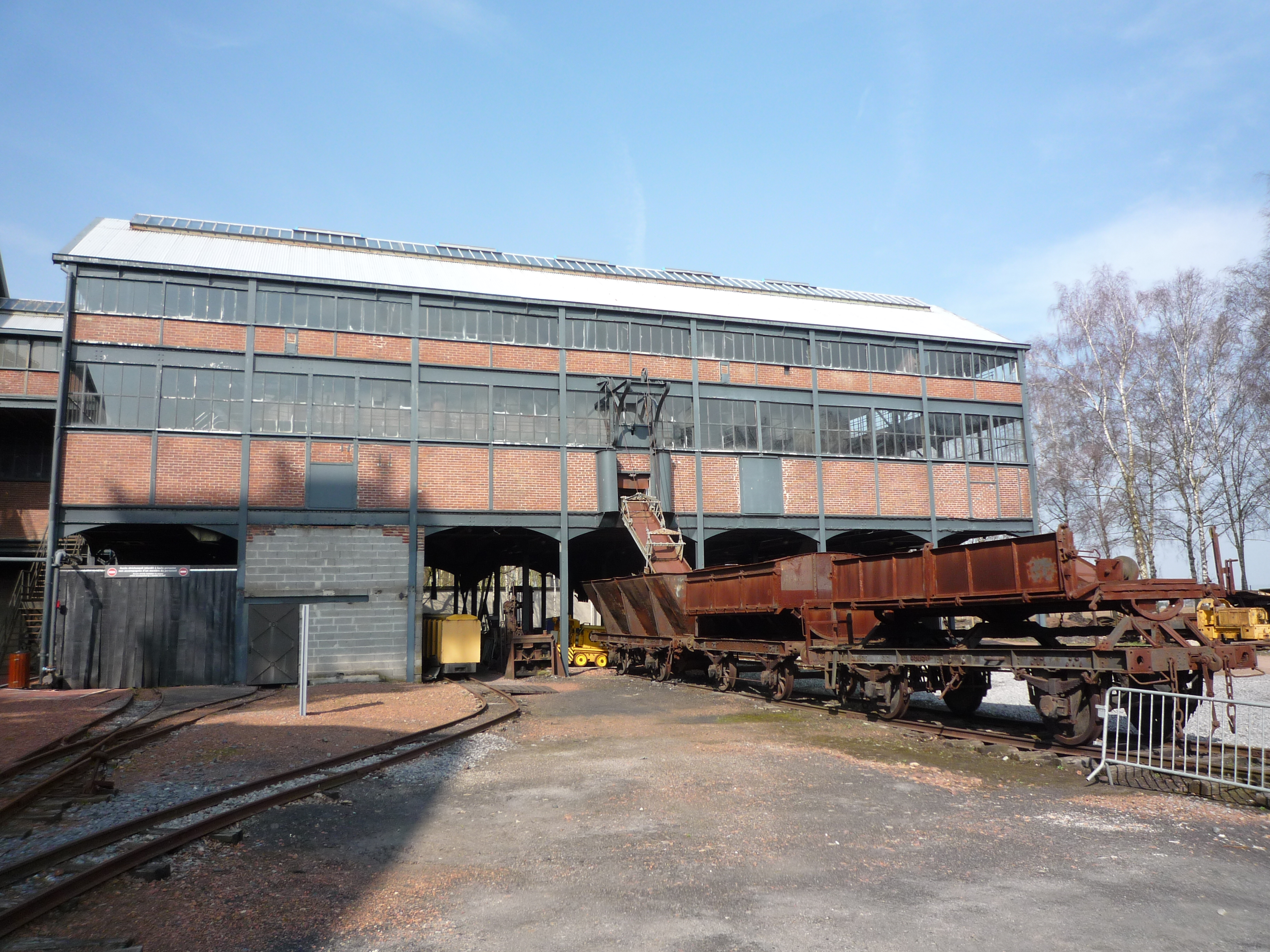 La Fosse Delloye de la Compagnie des mines d'Aniche était un charbonnage constitué de deux puits situé à Lewarde, Nord, Nord-Pas-de-Calais, France.